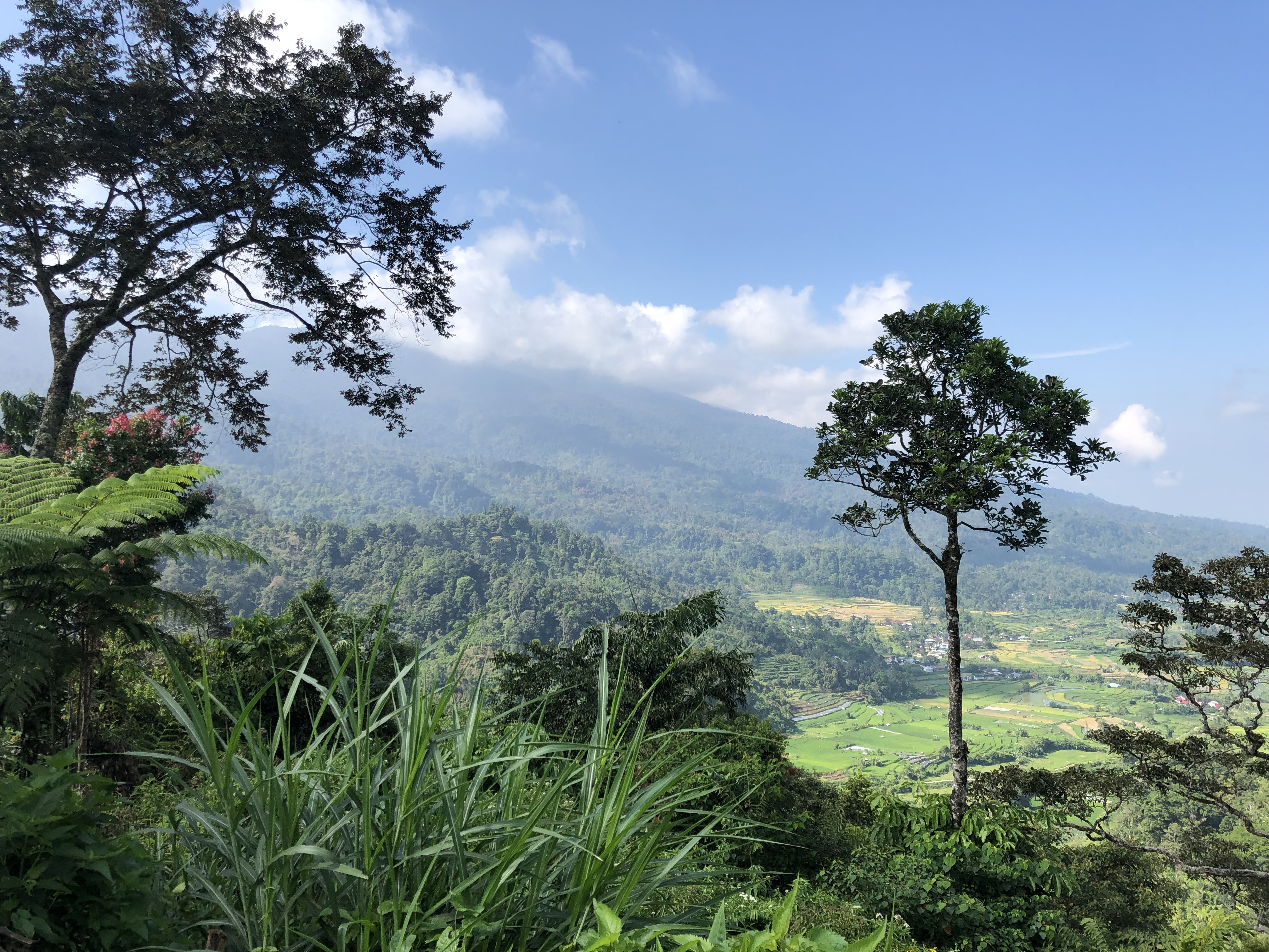 Pemandangan dari atas bukit Malalak, Kabupaten Agam, Sumatera Barat, Indonesia